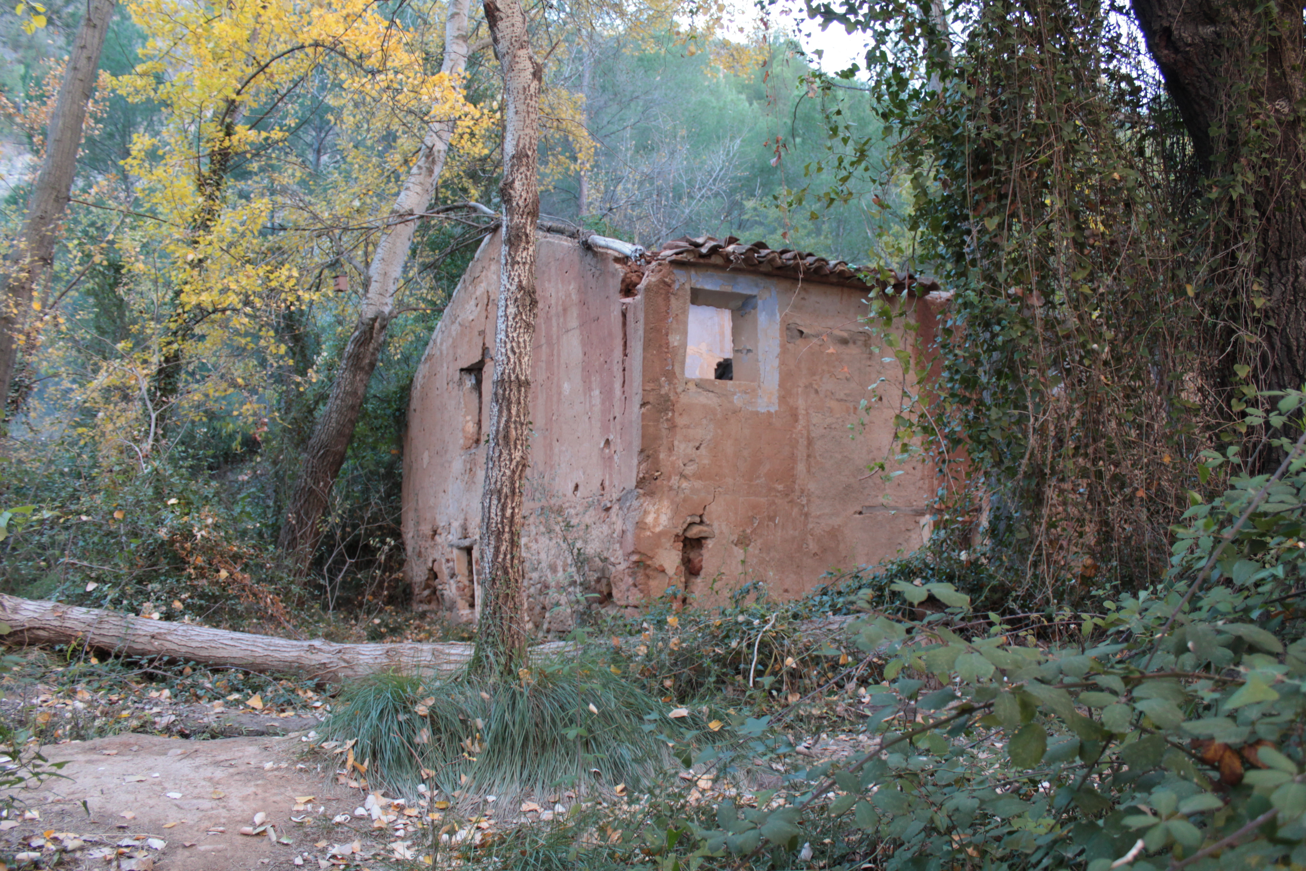 Casa abandonada junto al camino forestal de la zona del merendero situada a 2 kilómetros de Chelva.